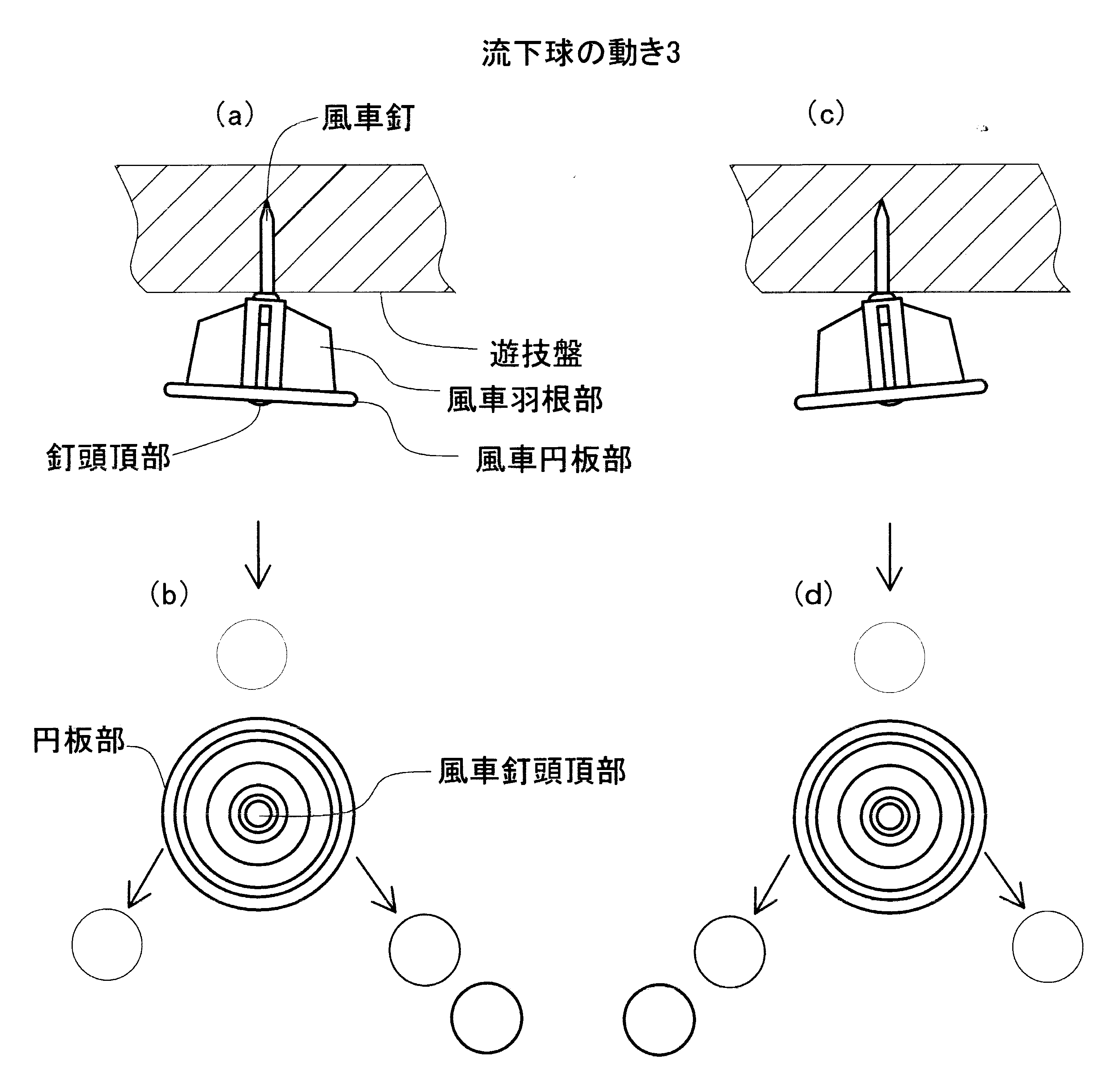 風車と球飛び方向